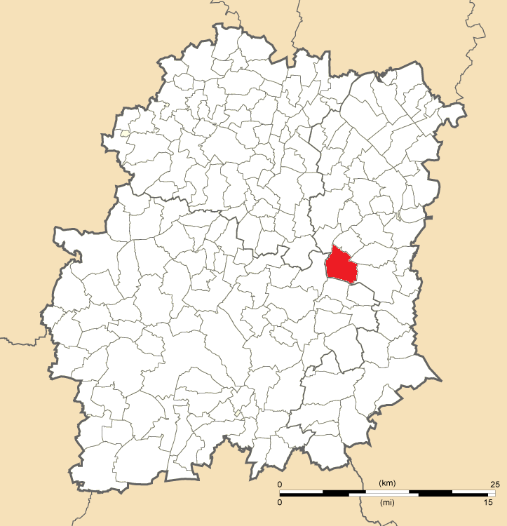 Carte de position de Ballancourt-sur-Essonne en Essonne (91)